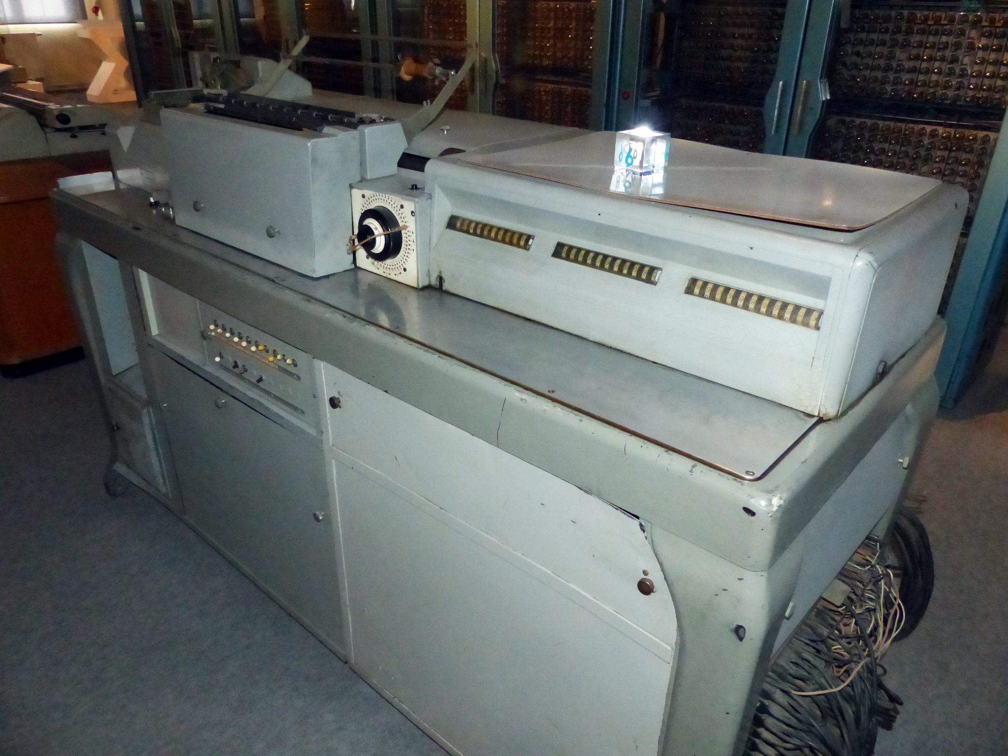 Tabelliermaschine D11, erste universelle numerische Tabelliermaschine, Deutsche Hollerith-Maschinen GMBH (DEHOMAG), Berlin, 1936-1945; Exponat in den Technischen Sammlungen Dresden